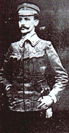 Wladyslaw Sikorski, jako oficer legionów